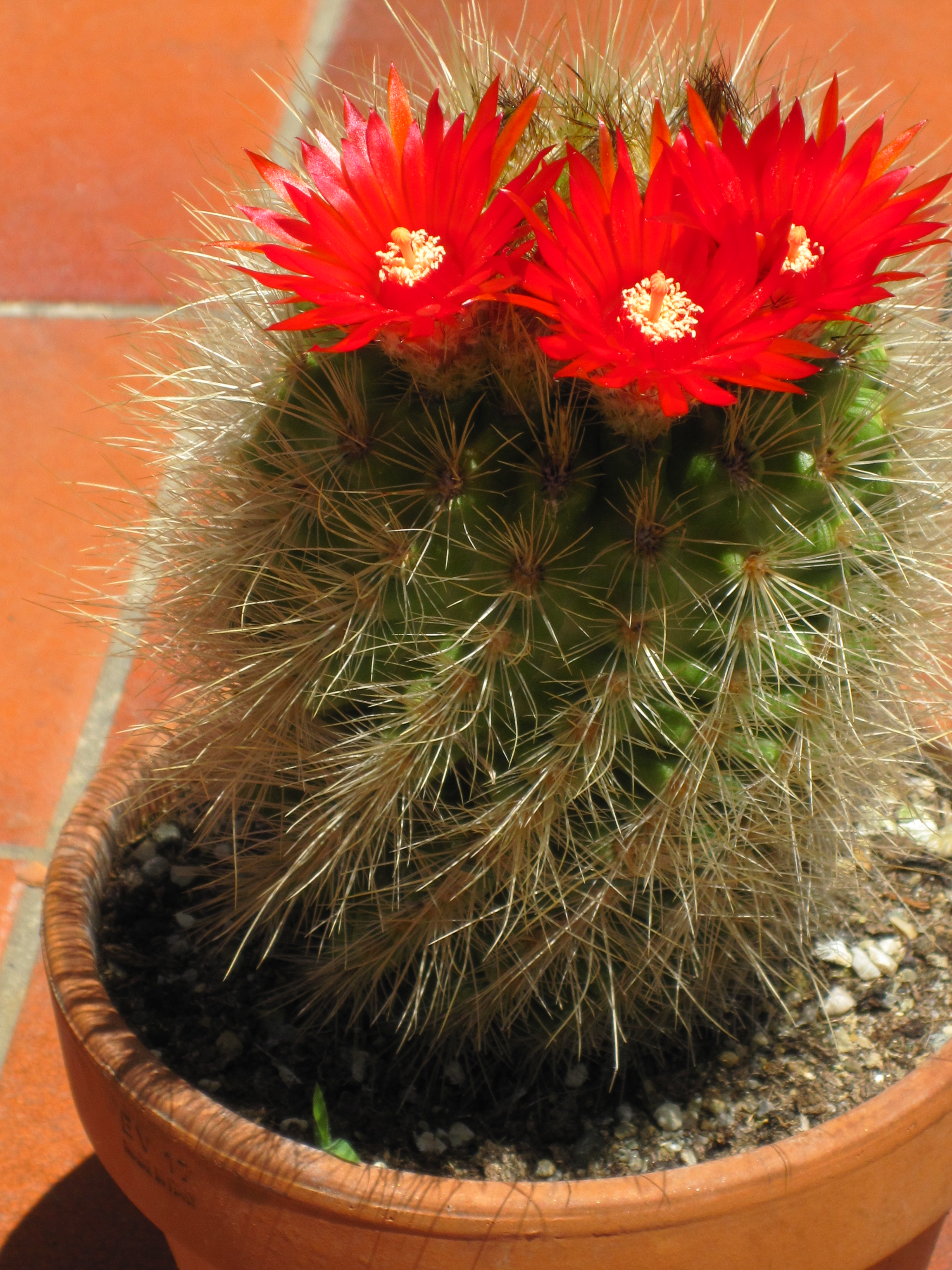 I fiori della parodia penicillata